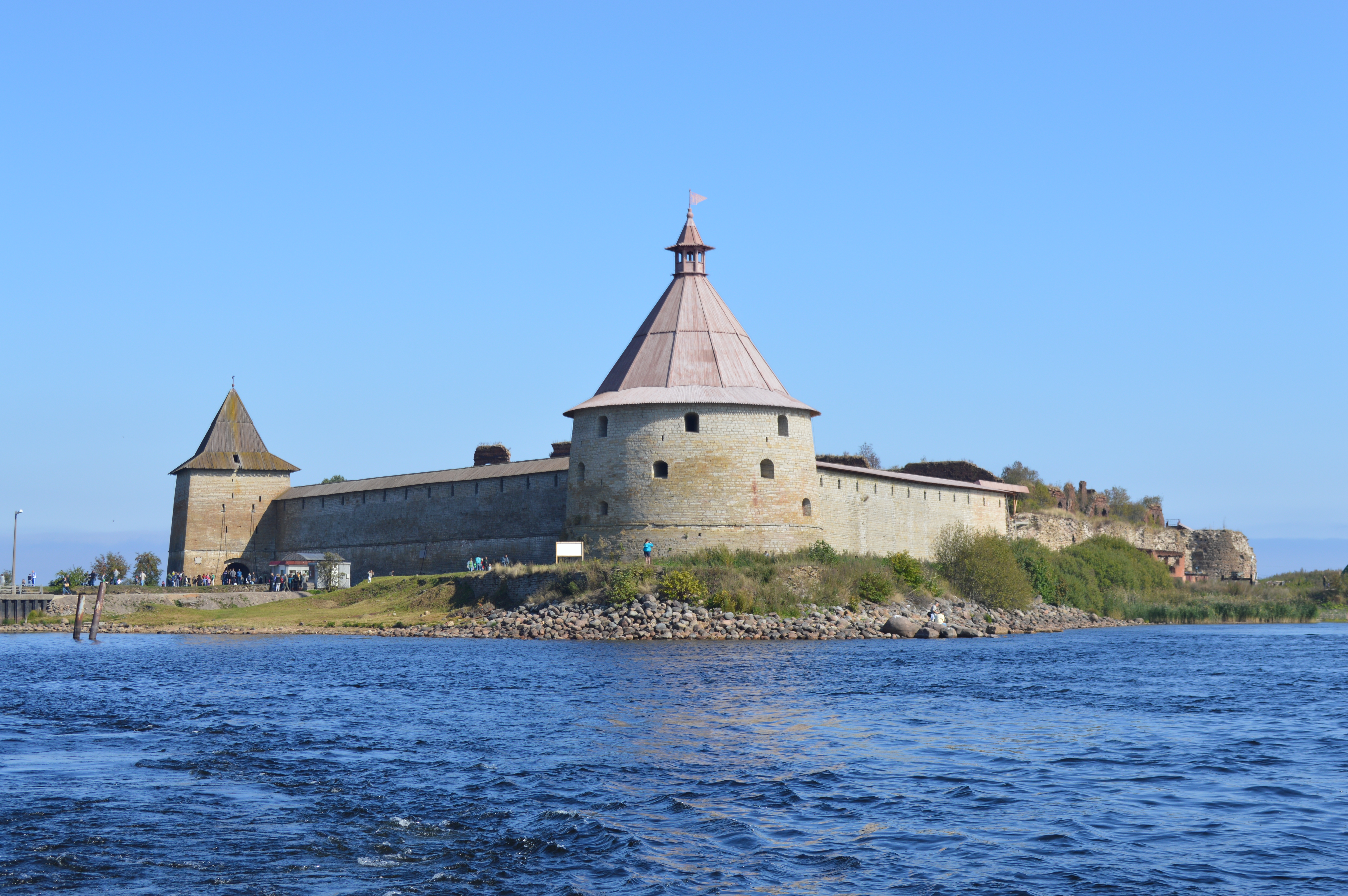 Бастион Головина (Лен.область, Шлиссельбург, в истоке р. Нева)